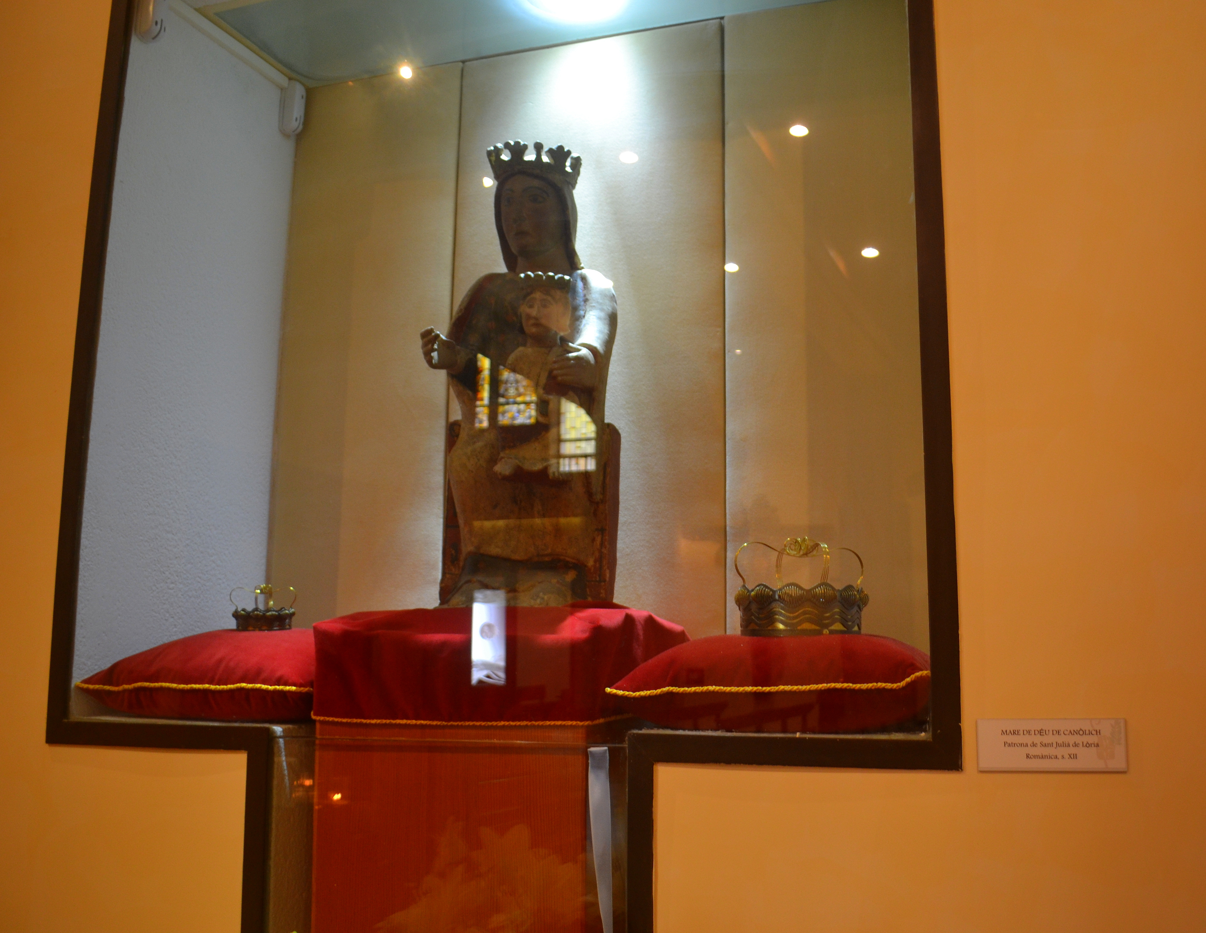 Església de Sant Julià i Sant Germà de Lòria